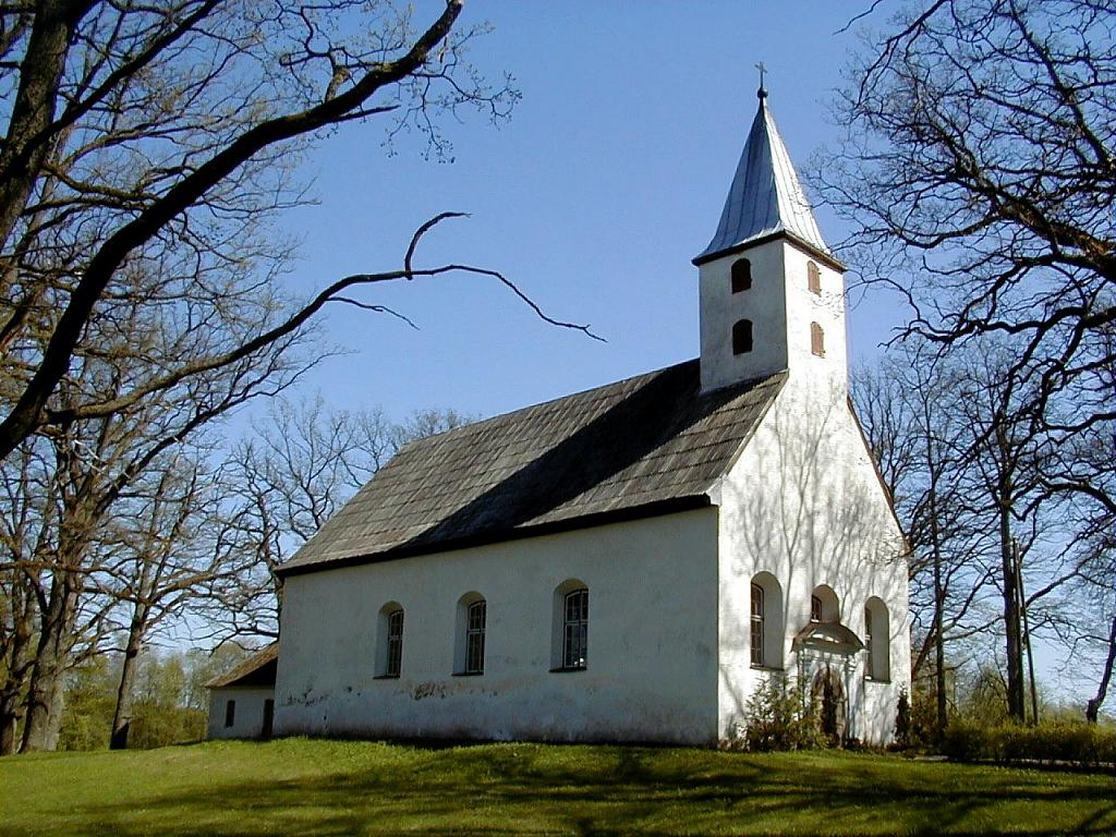 Mālpils baznīca 2001-05-05